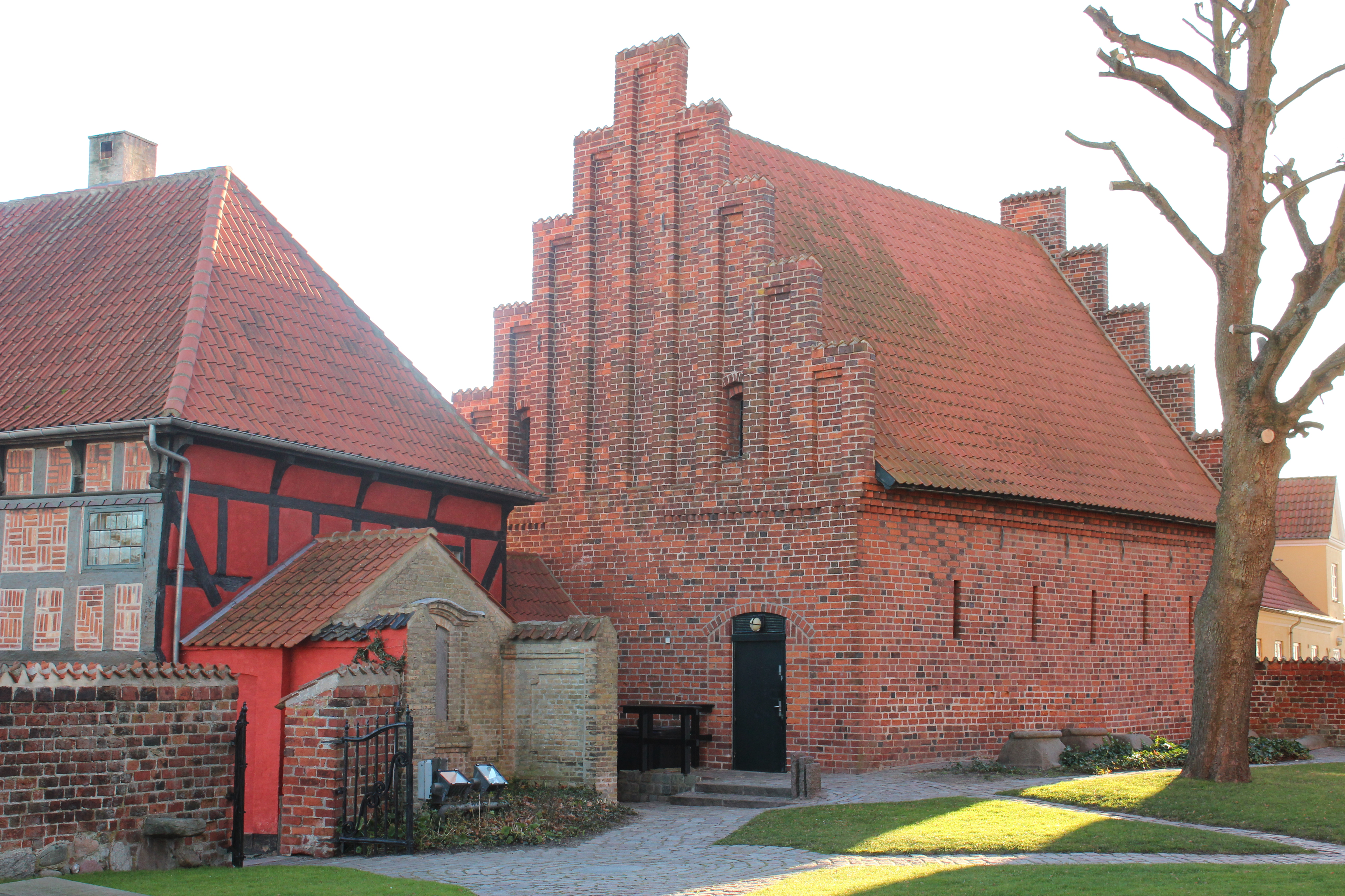 Præstegade 16. Fredet bygning fra 1500-tallet.